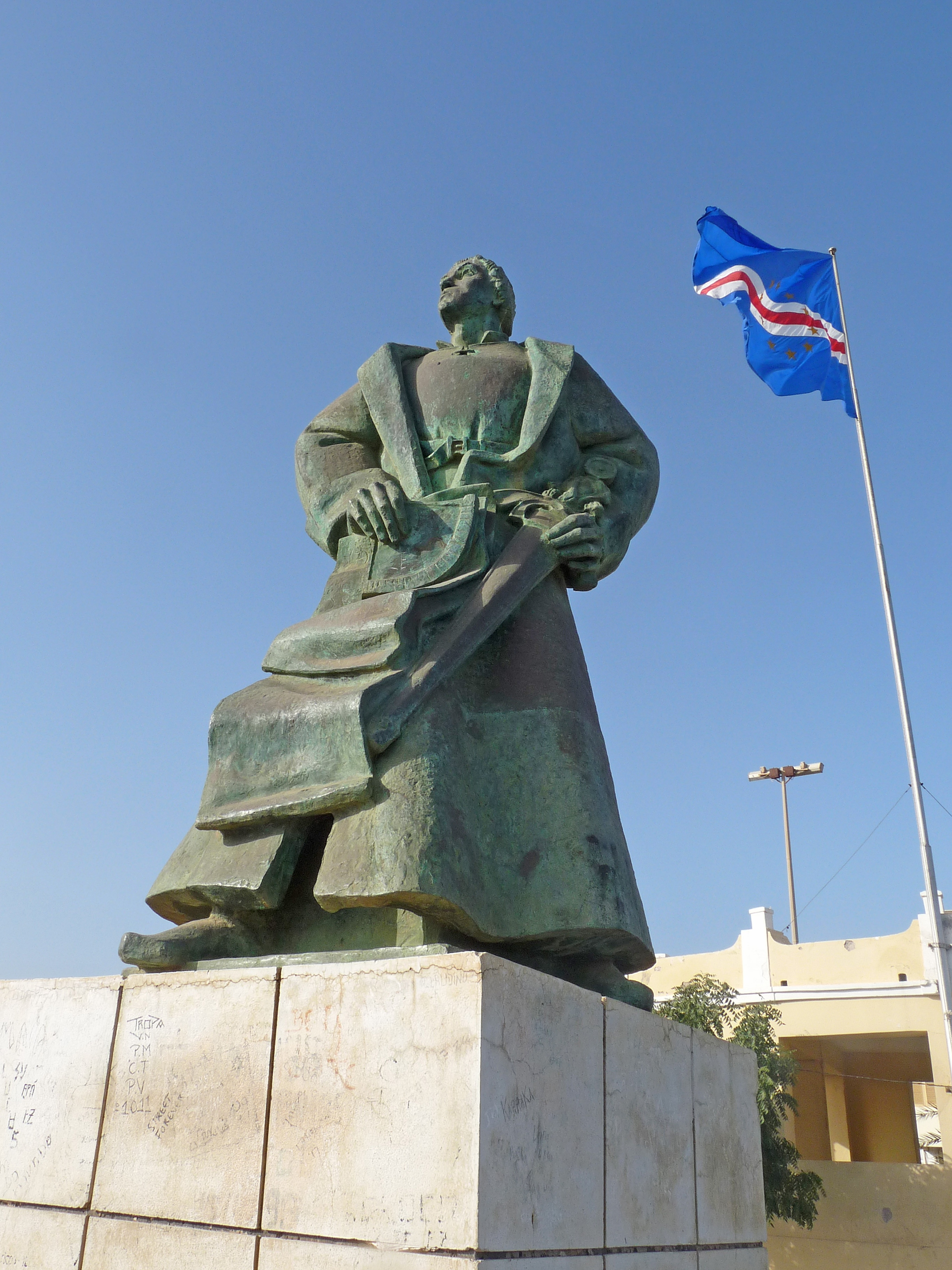 Praia (Cap-Vert) : monument à la mémoire de l'explorateur portugais Diogo Gomes